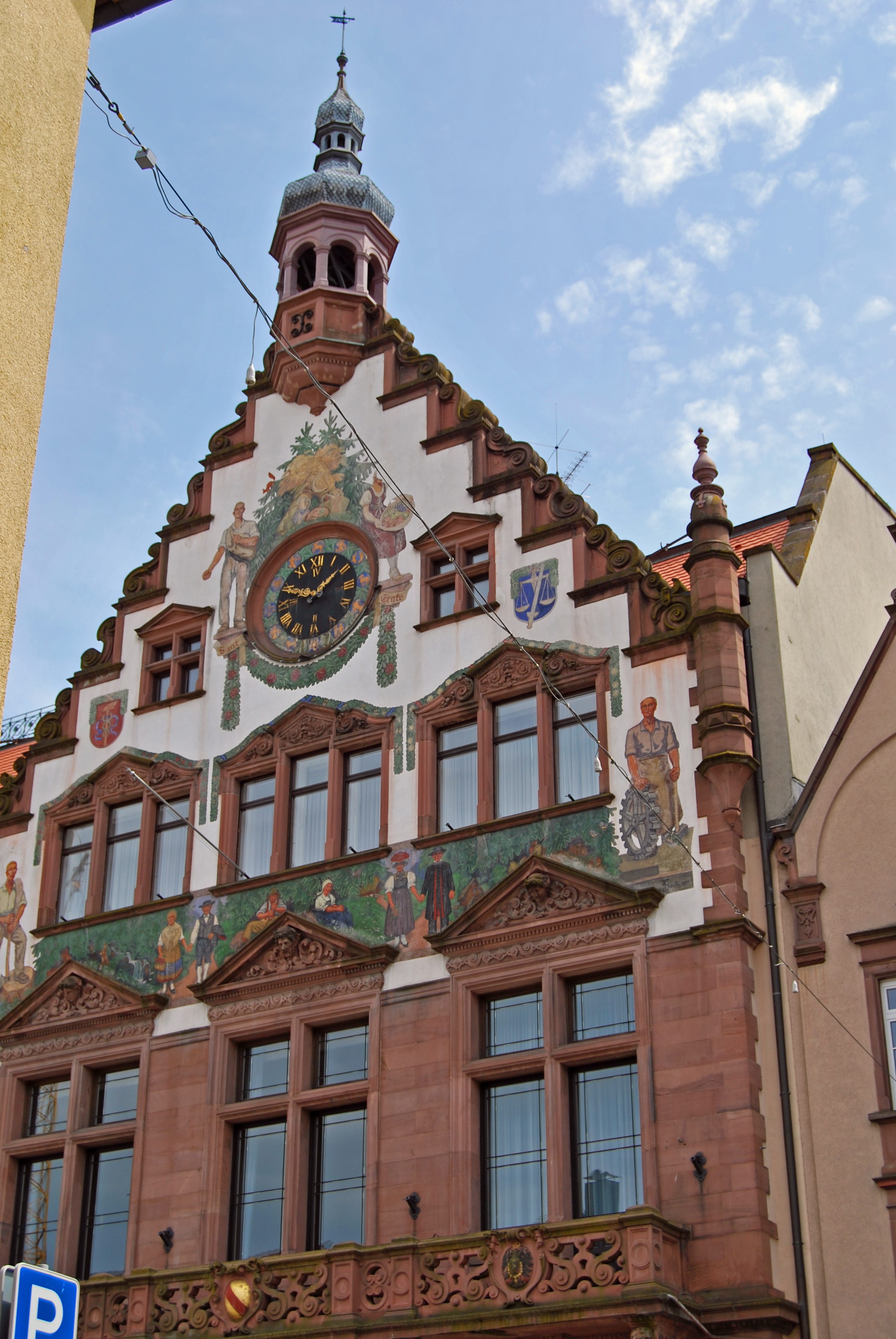 Rathaus in Wolfach